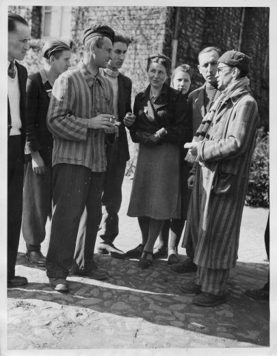 Befreite polnische Häftlinge des Außenlagers Ellrich-Juliushütte des KZ Mittelbau-Dora im Gespräch mit befreiten polnischen Zwangsarbeitern in Ellrich.